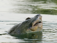 Rùa Hồ Gươm